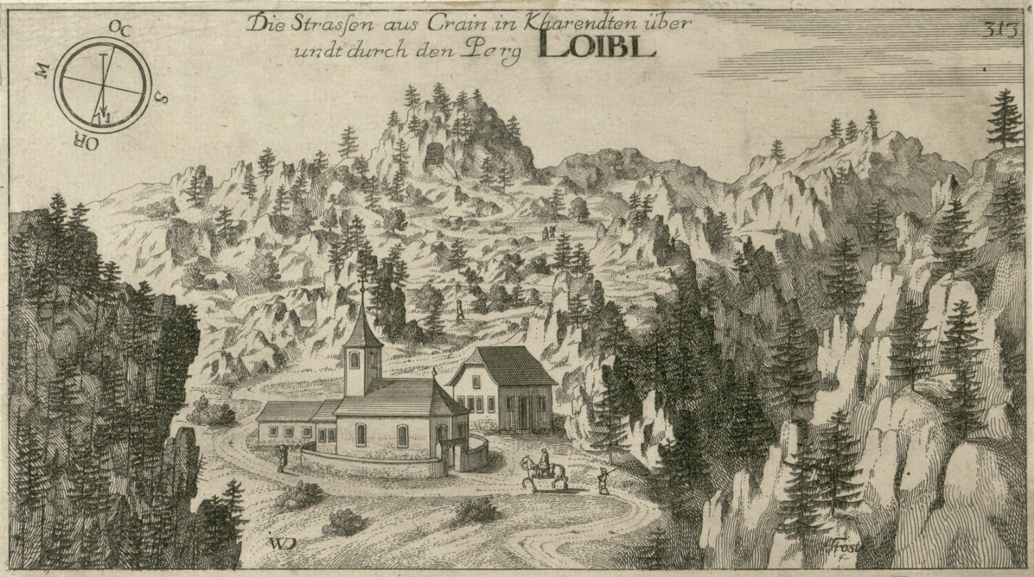 Ljubelj